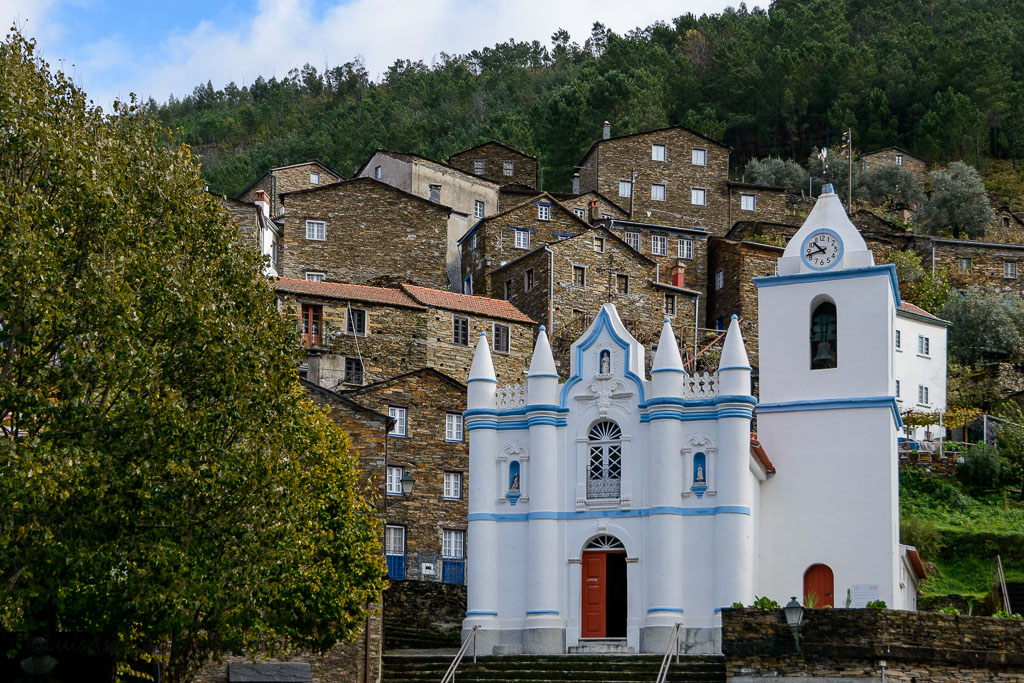 Piodão #3